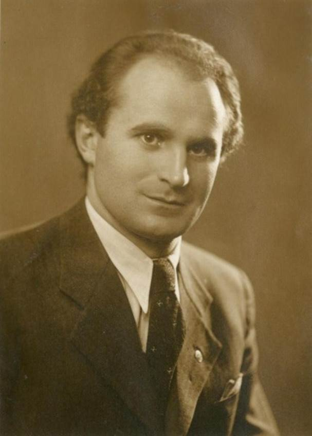 Járay József magyar operaénekes (tenor).